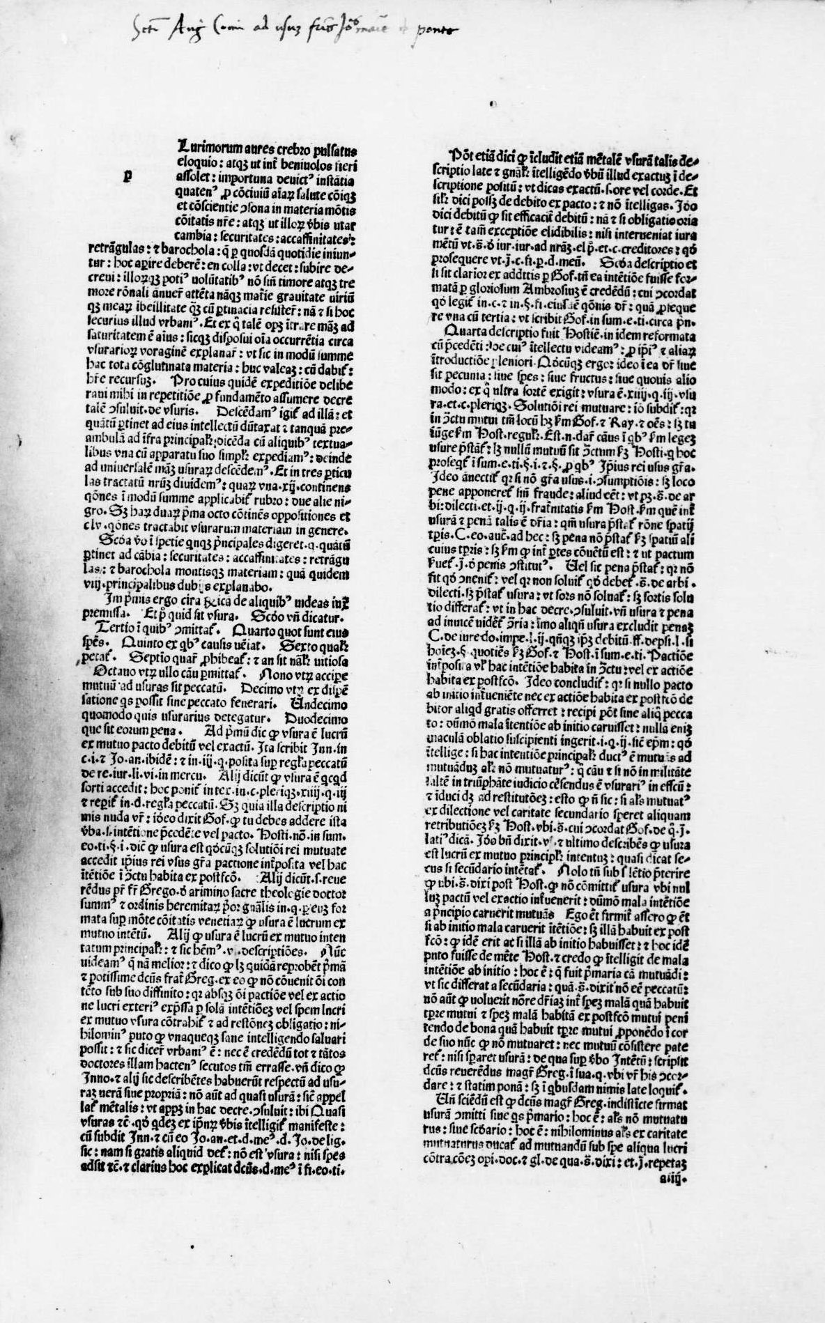 Carta a4r